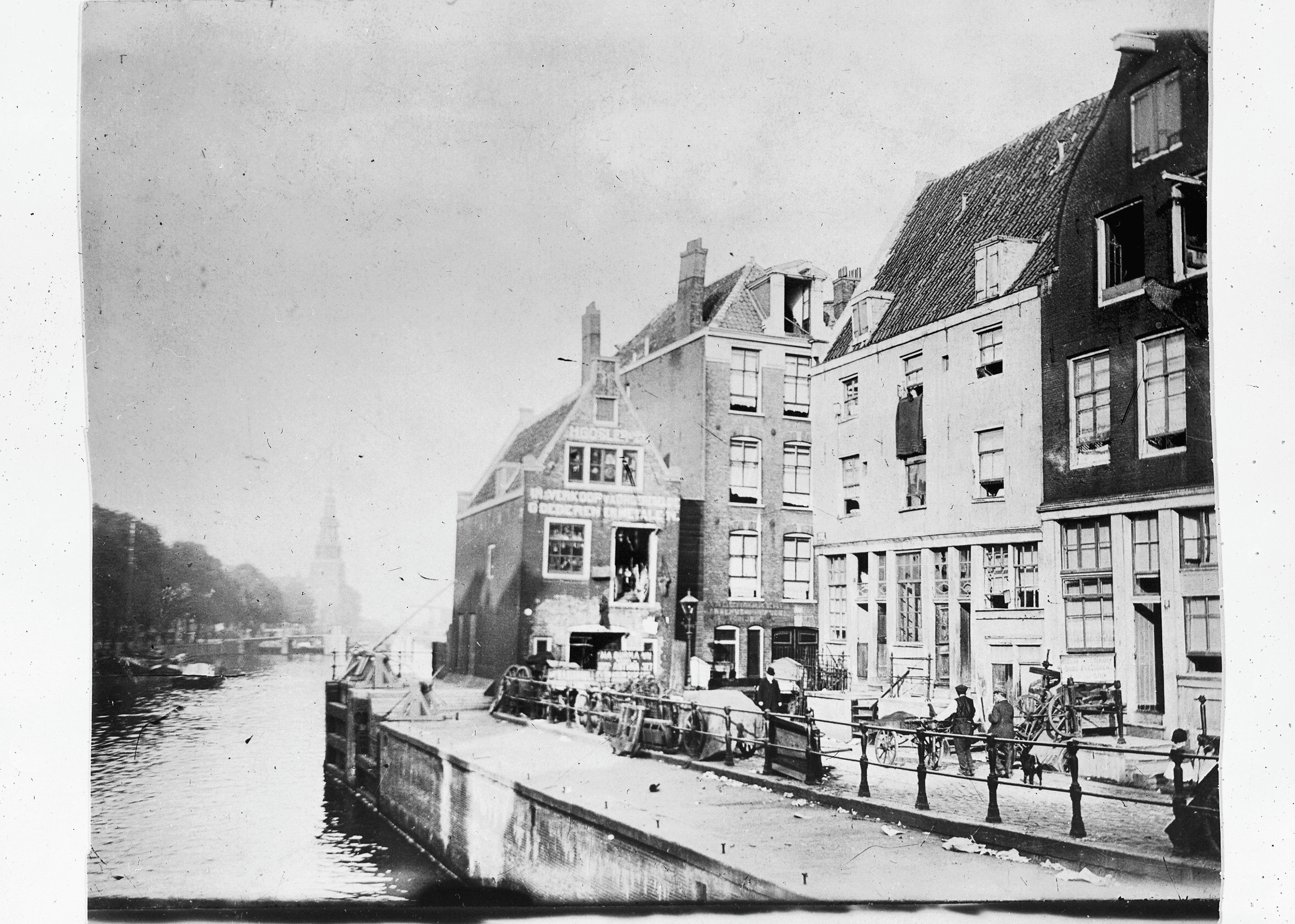 Overzicht van de Sint-Antoniesluis, met rechts daarvan huizen aan de Joden Houttuinen. Het linkerhuis, bekend als "Goslerhuis(je)" is het enige dat er nog staat.